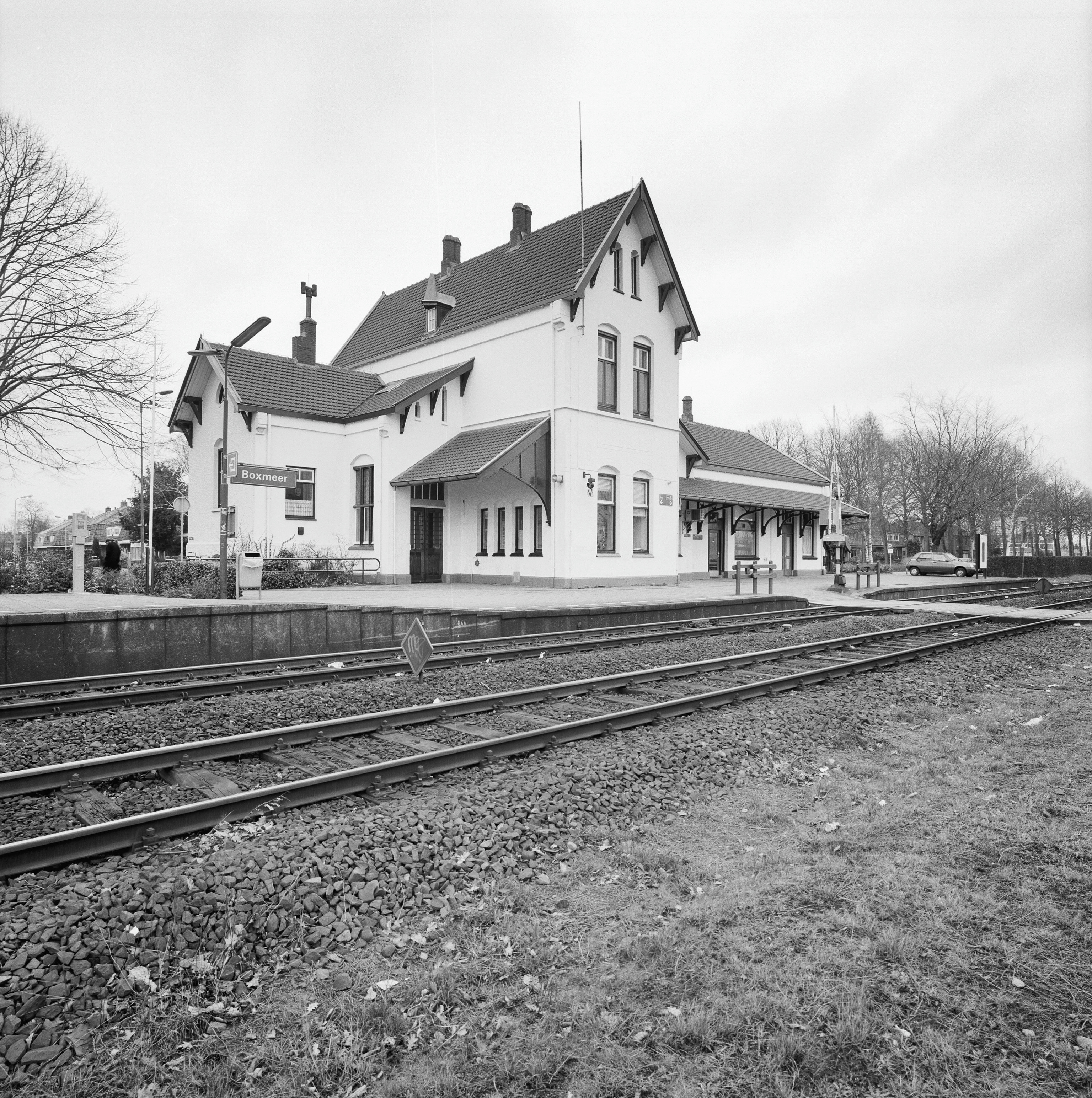 Station: Exterieur OVERZICHT ACHTERGEVEL